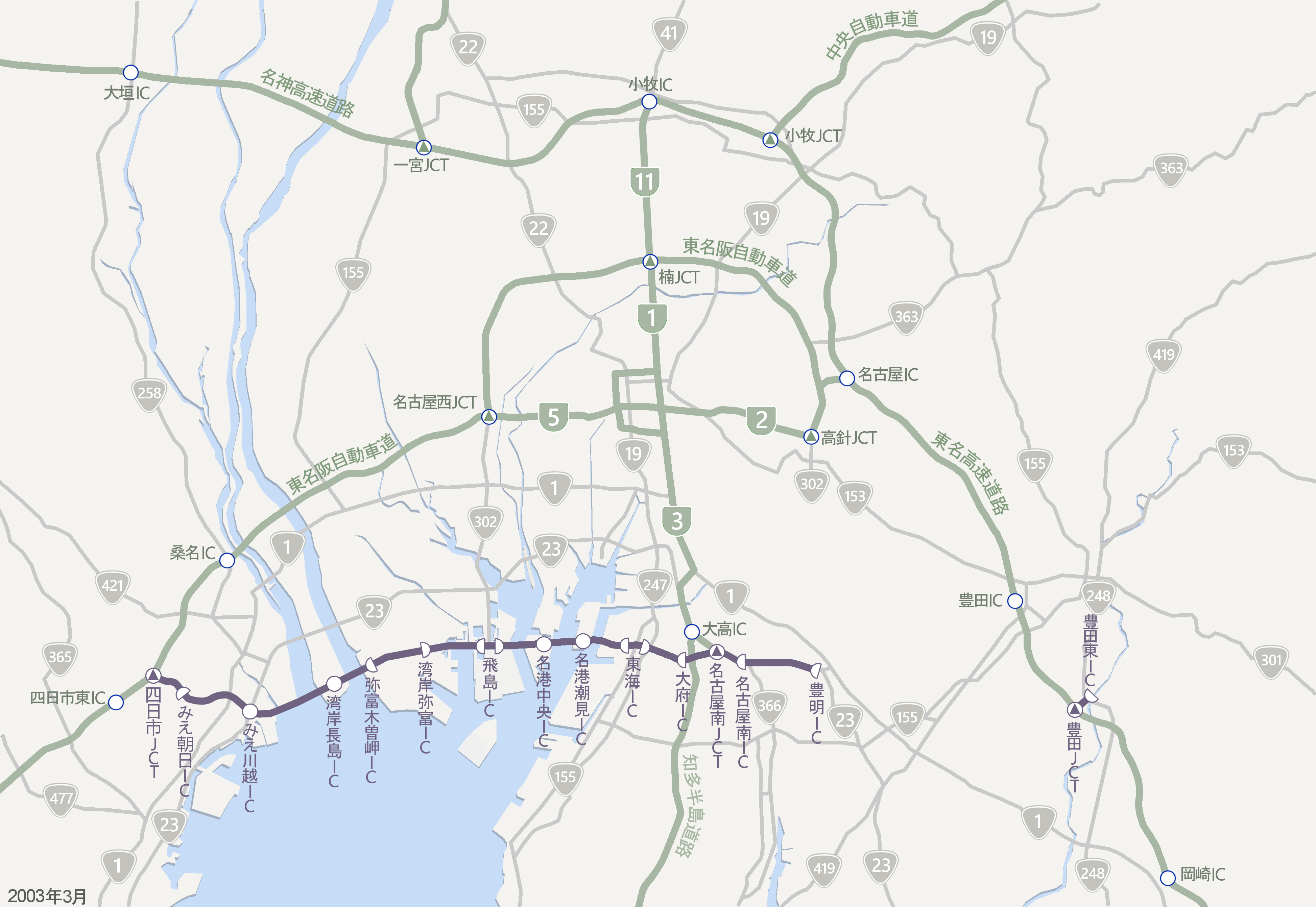 伊勢湾岸自動車道2003年3月時点